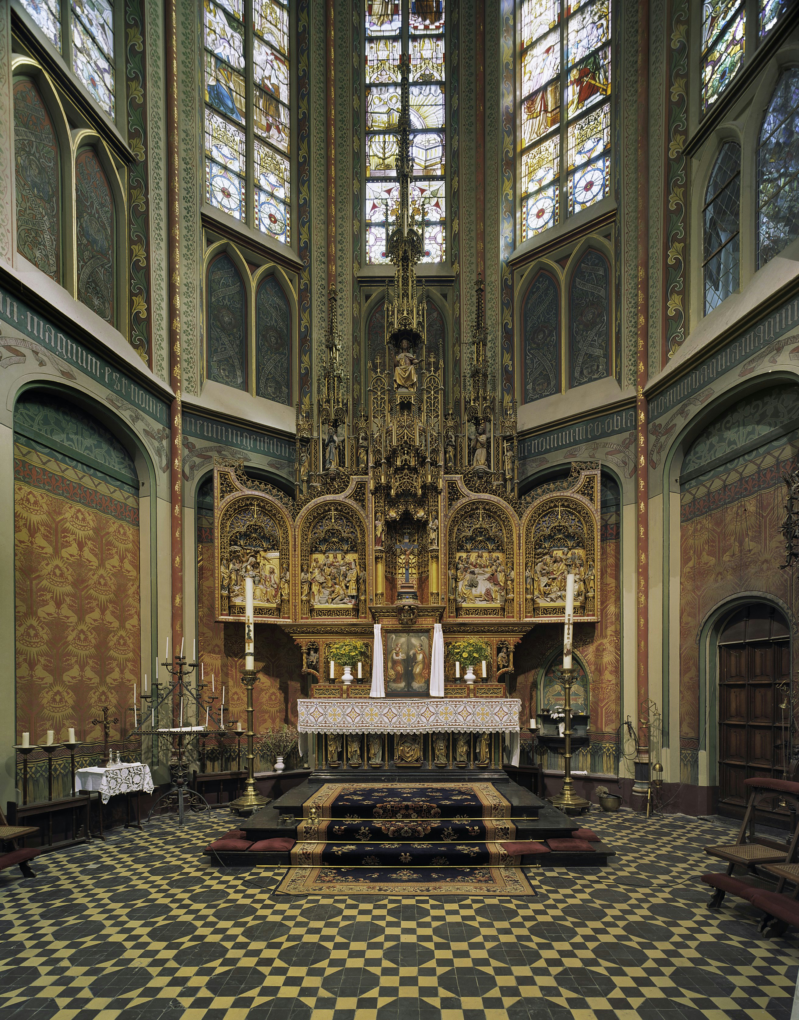 Sint Willibrorduskerk: Interieur, overzicht hoofdaltaar (opmerking: Boek: "66 Kanjermonumenten")